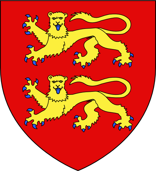 Blason de la Normandie